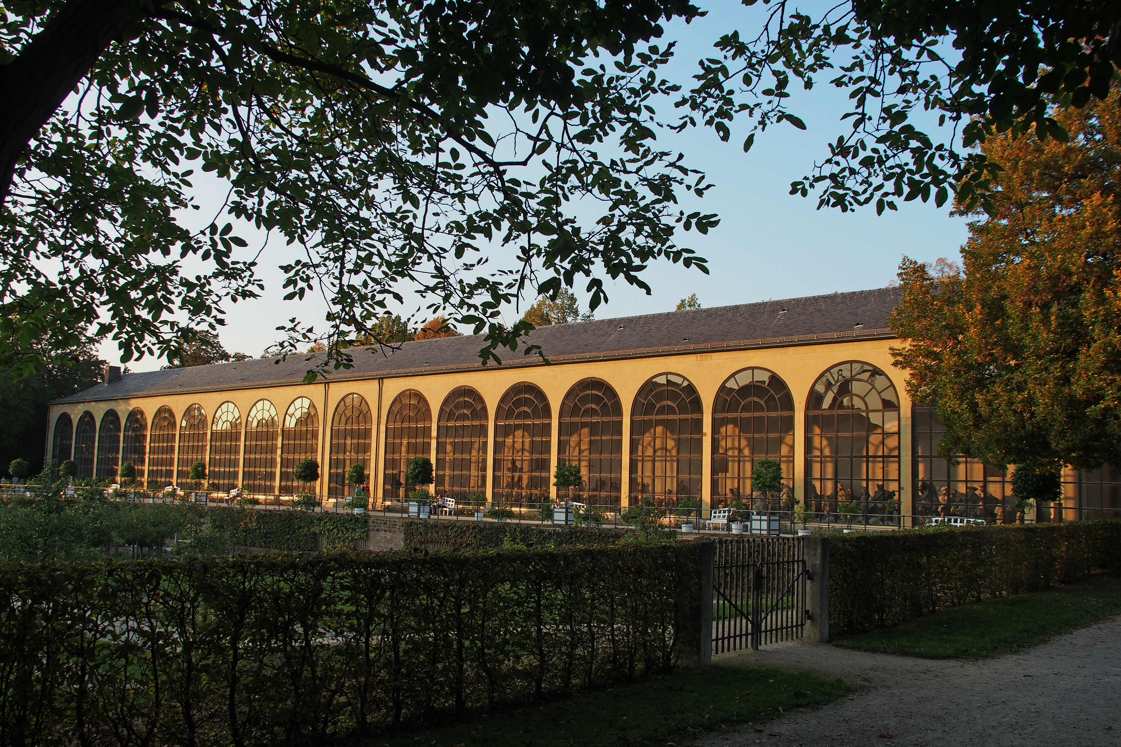 Orangerie im Hofgarten der Residenz